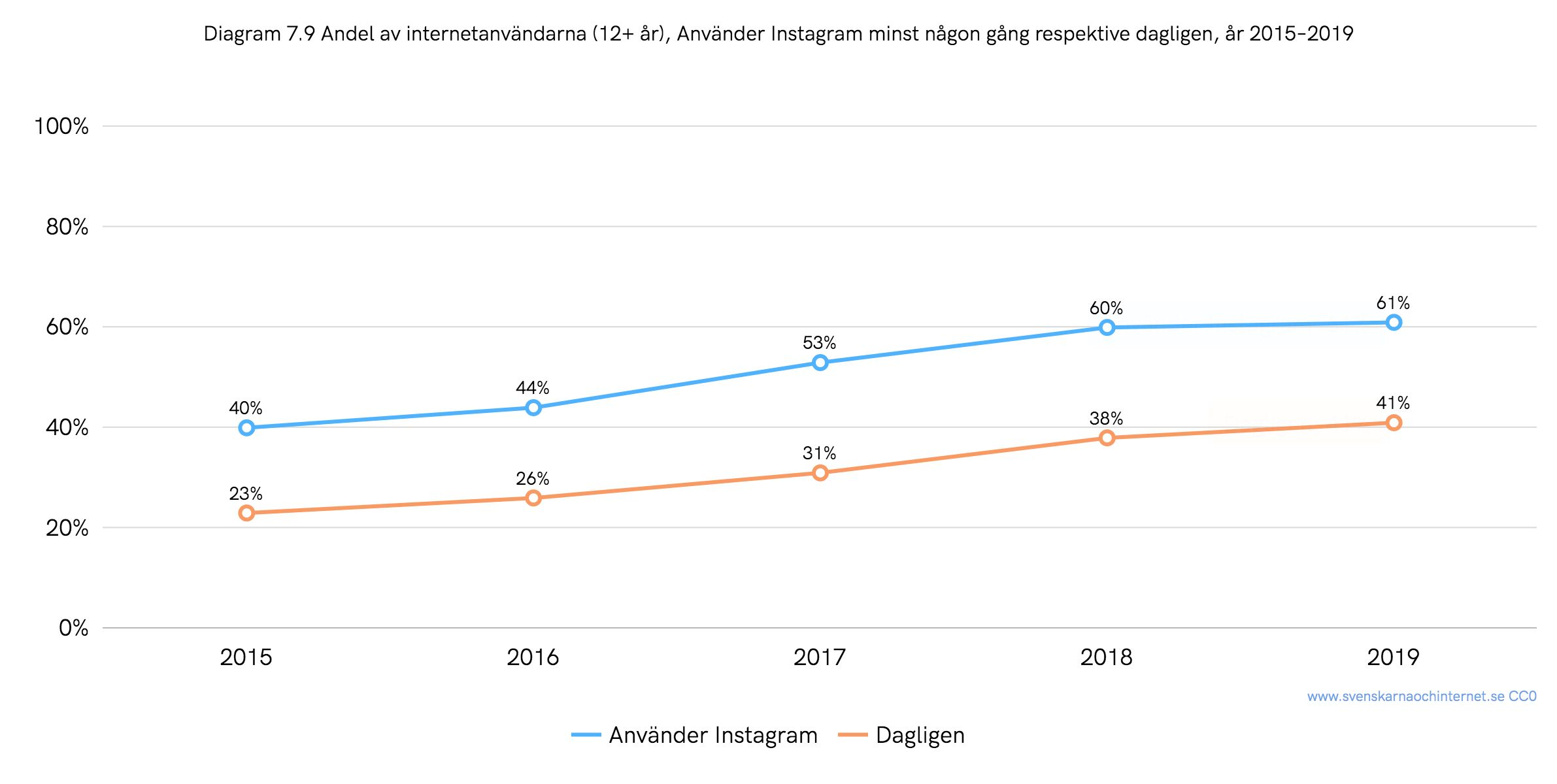 Andel av de svenska internetanvändarna (12+ år) som använde Instagram minst någon gång respektive dagligen, år 2015–2019. Siffror från undersökningen "Svenskarna och internet".